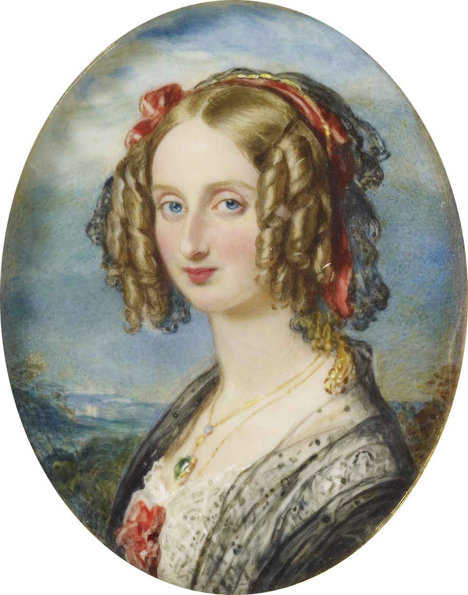 Miniatur mit dem Porträt der belgischen Königin Louise d'Orléans